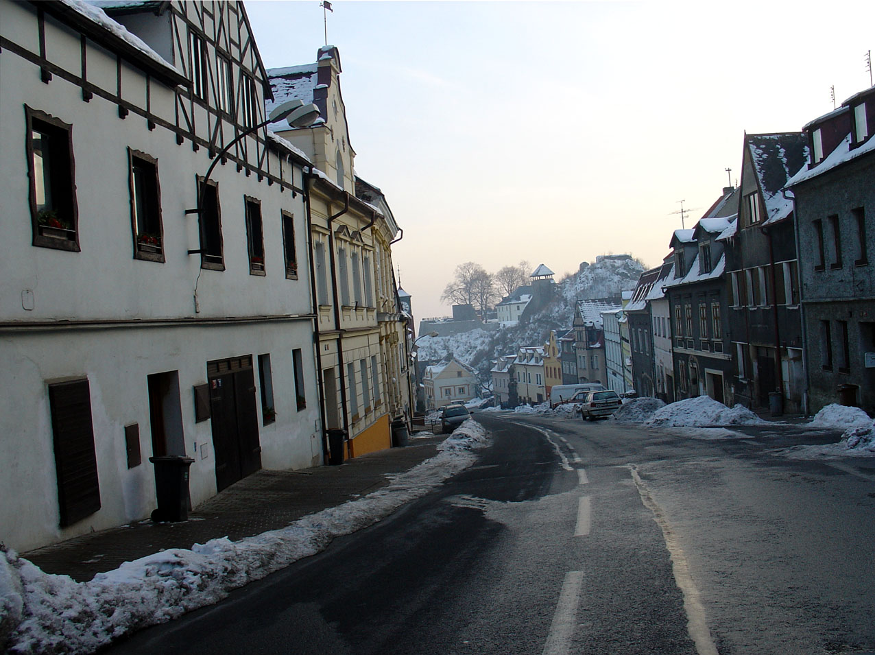 Graupen (Krupka) Blick zur Burg